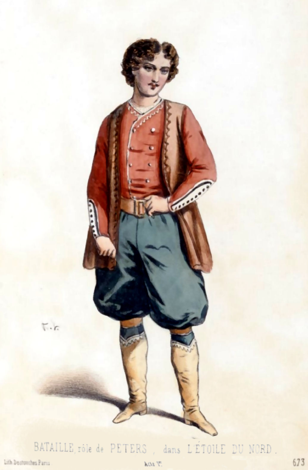 Bataille, rôle de Peters, dans L'étoile du nord, acte 1 (lithographie d'Alexandre Lacauchie)